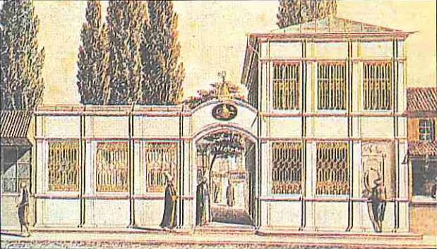 Galata Mevlevihanesi'nin ön cephesini gösteren 18. yüzyıla ait bir gravür.